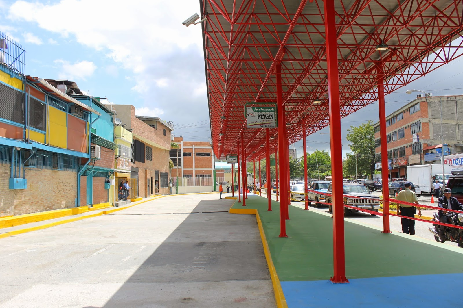 Parada de la linea de autobuses Guarenas-Guatire en Valle Verde Guareas.